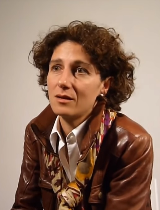 Entrevista a Marina Garcés.